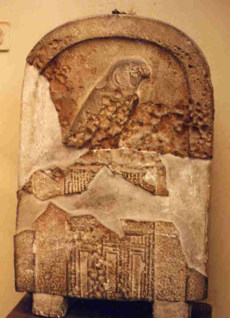 Stela of King Djer from Abydos